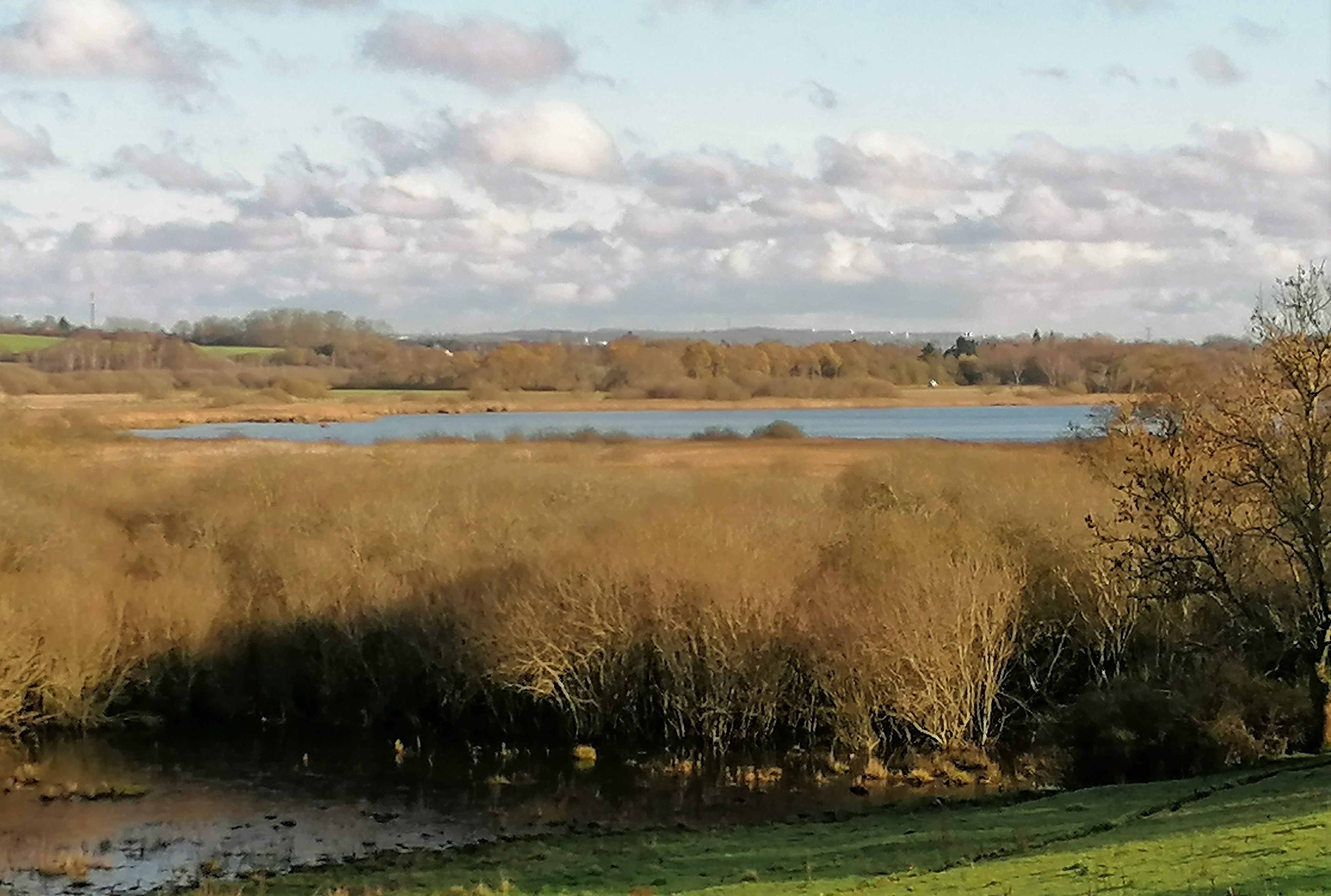 Tåstrup Sø ligger i et Natura 2000 og naturfredet område